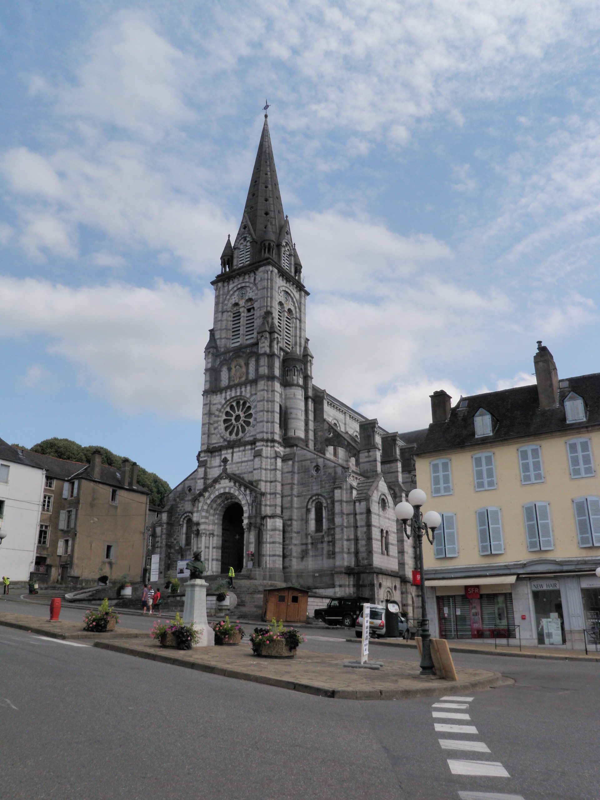 Église Notre-Dame d'Oloron Sainte marie, pays basque